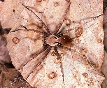 female Dolomedes zatsun from Okinawa.